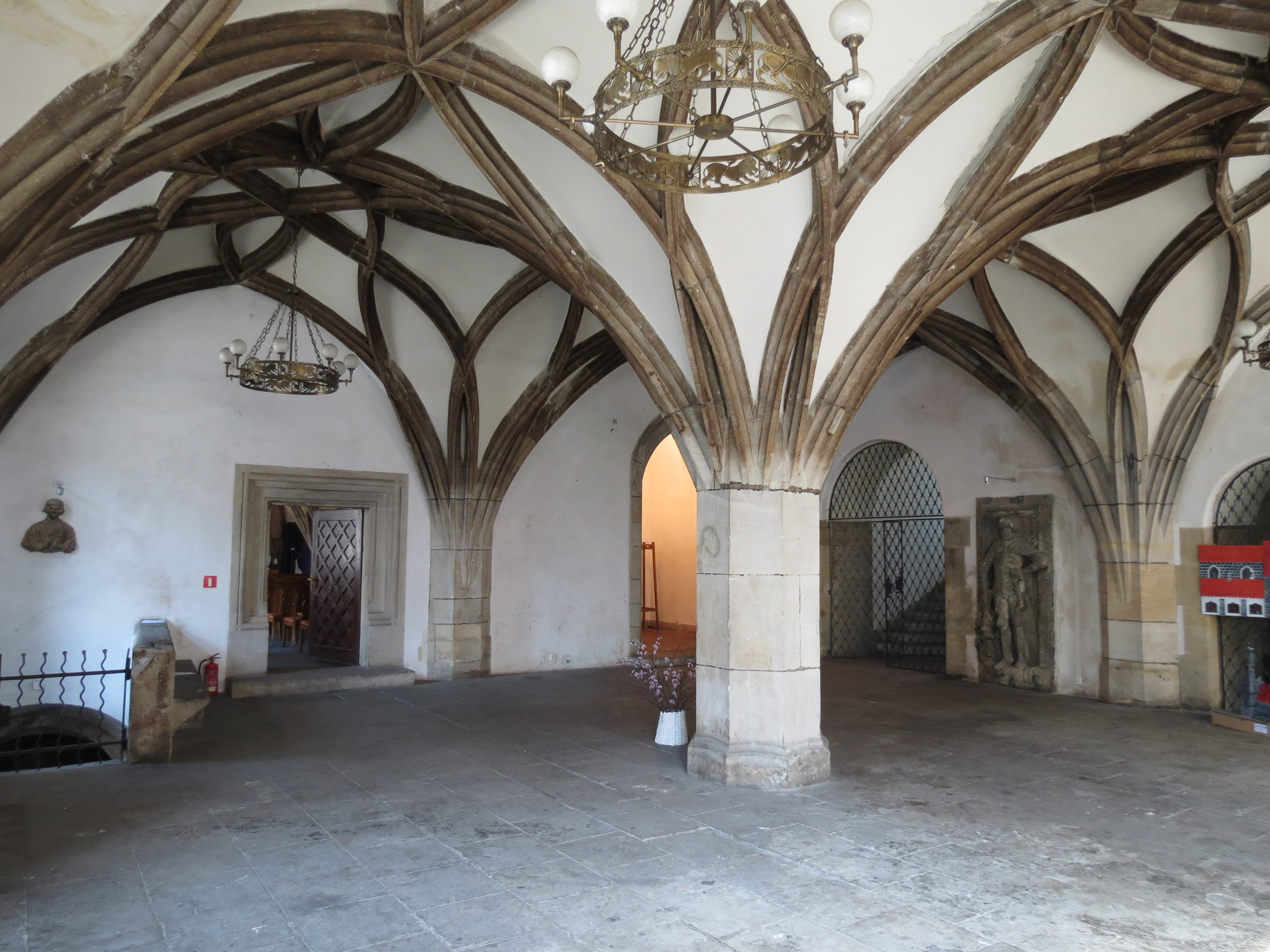 Lwówek Śląski, ratusz, 1522, 1545, 1905